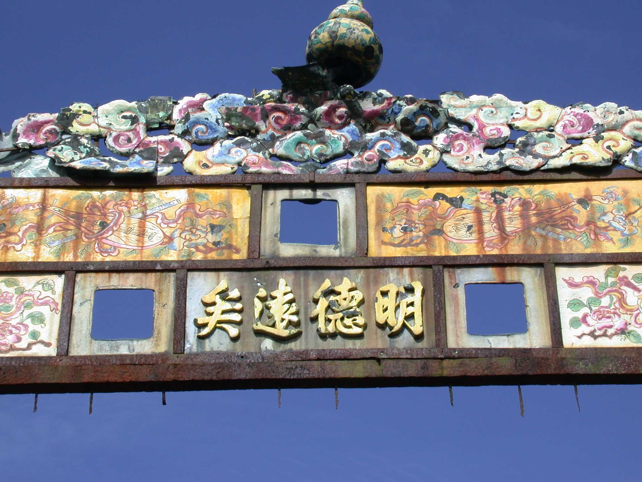 Picture of Casablanca1911